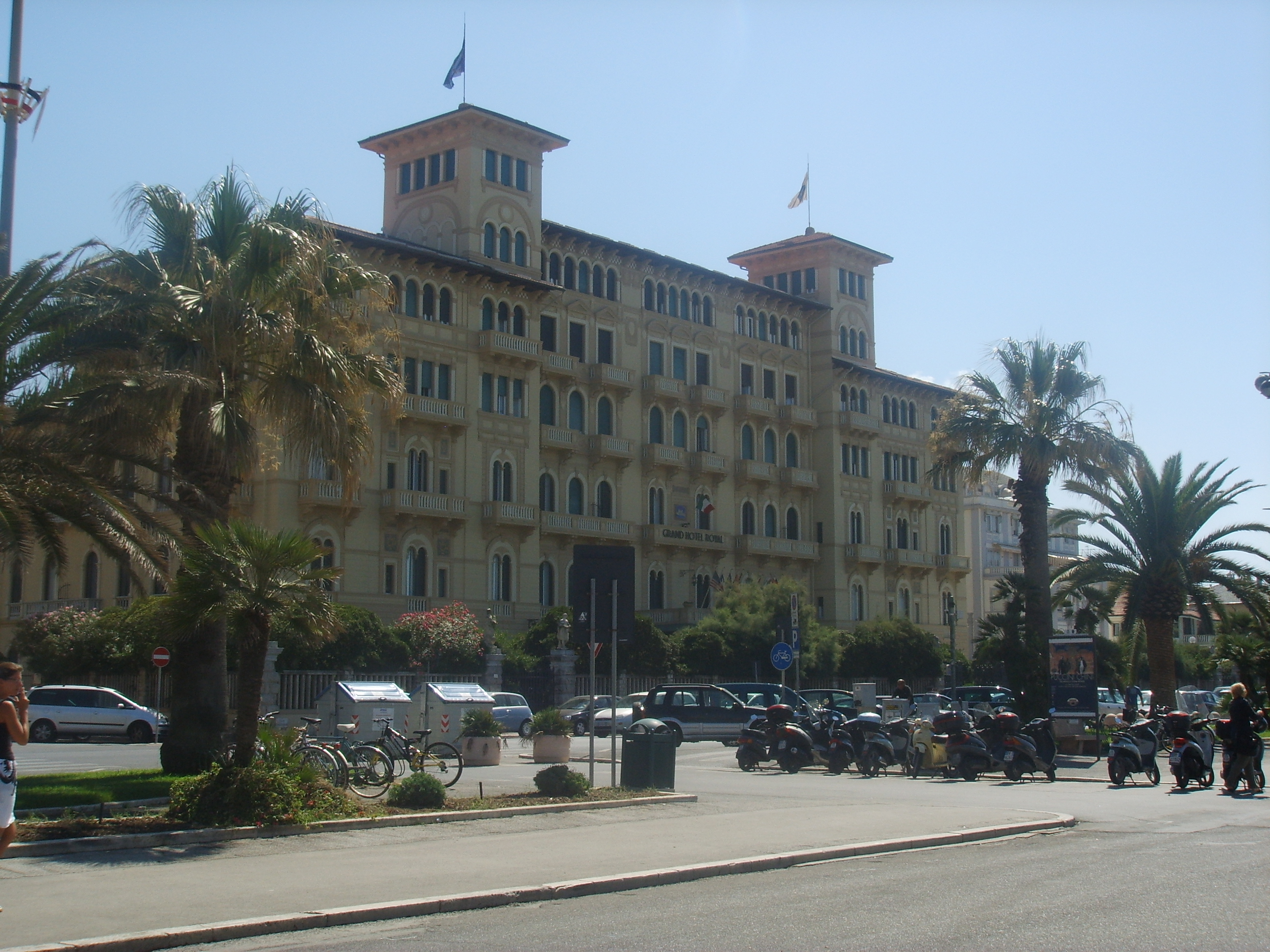 Viareggio, hotel royal in Viareggio, italy